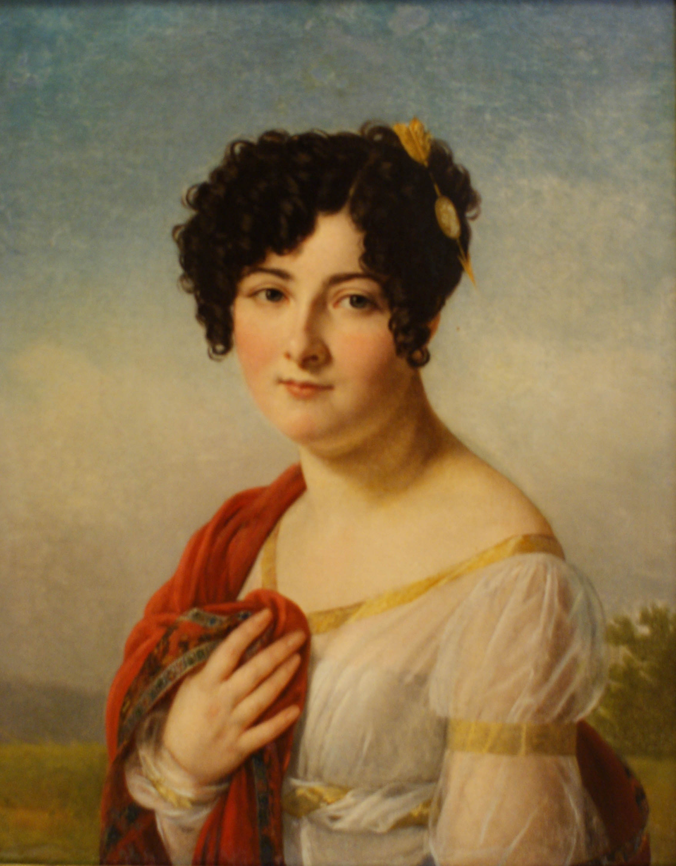 Юлия Александровна Татищева, в первом браке Безобразова (1785-1834), жена посланника Д.П.Татищева. Холст, масло